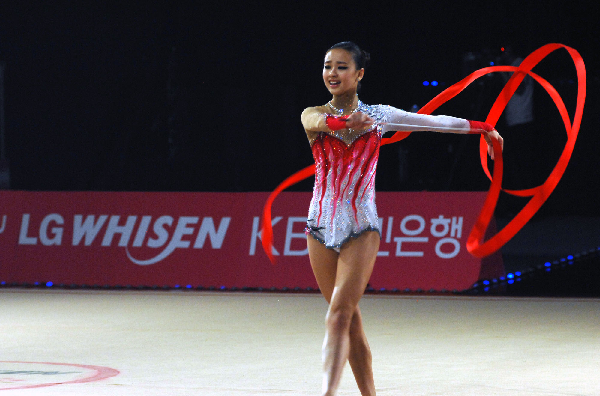 LG전자가 6일, 7일 이틀간 일산 킨텍스에서 국내 유일의 리듬체조 갈라쇼인 ‘LG 휘센 리드믹 올 스타즈 2012(LG WHISEN Rhythmic All Stars 2012)’ 행사를 개최했다.